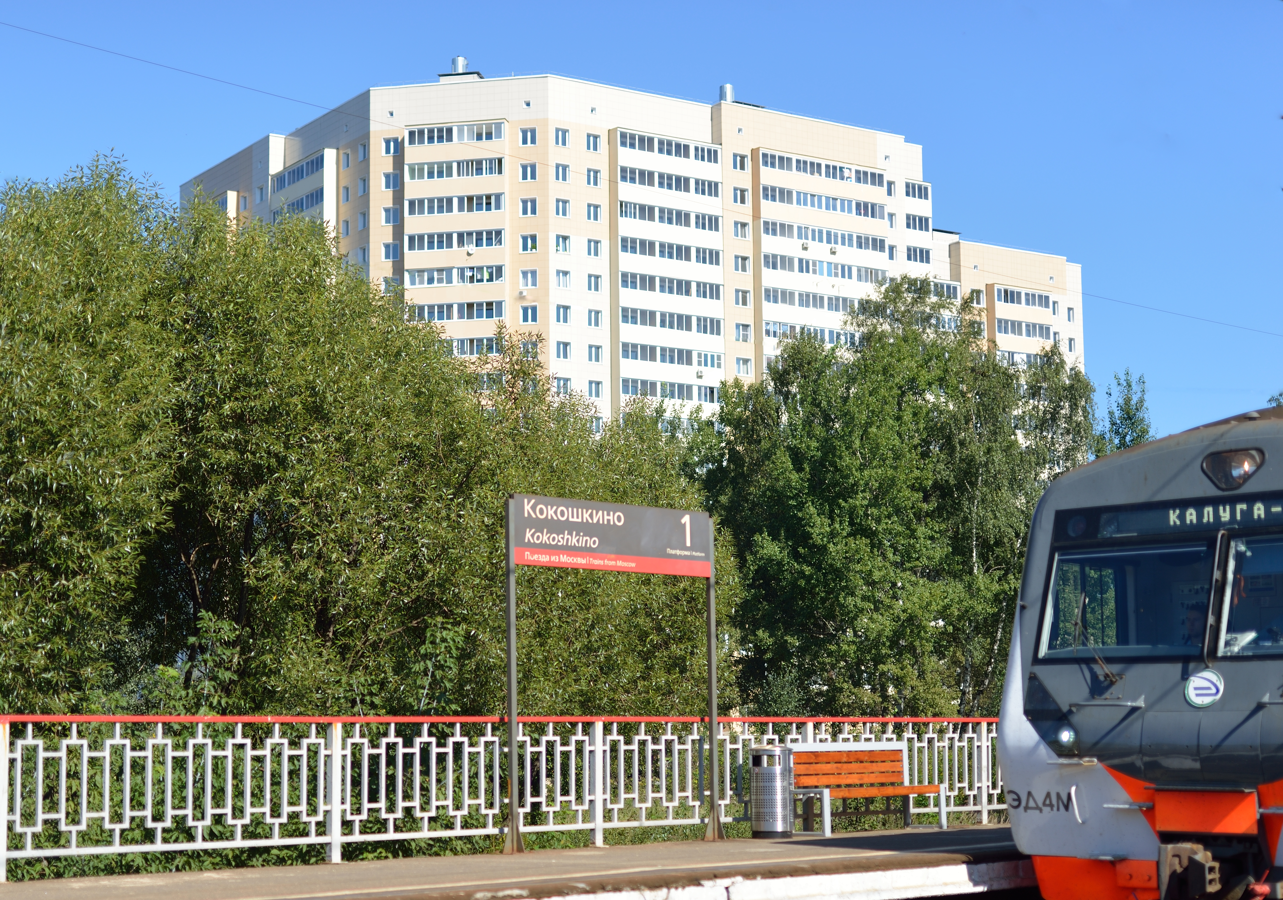 Платформа «Кокошкино» и одноимённое поселение в Новомосковском административном округе Москвы